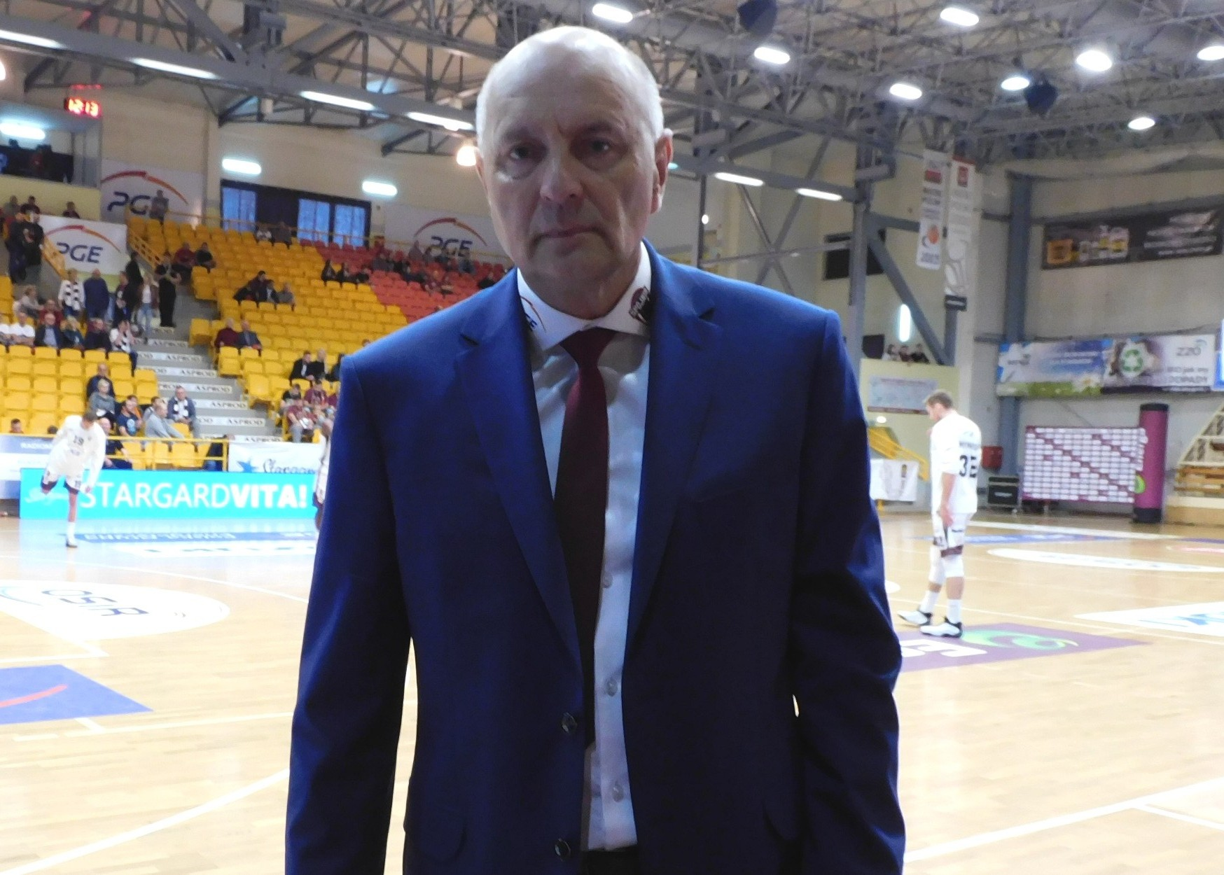 Wiceprezes PGE Spójni Stargard - Tadeusz Gutowski